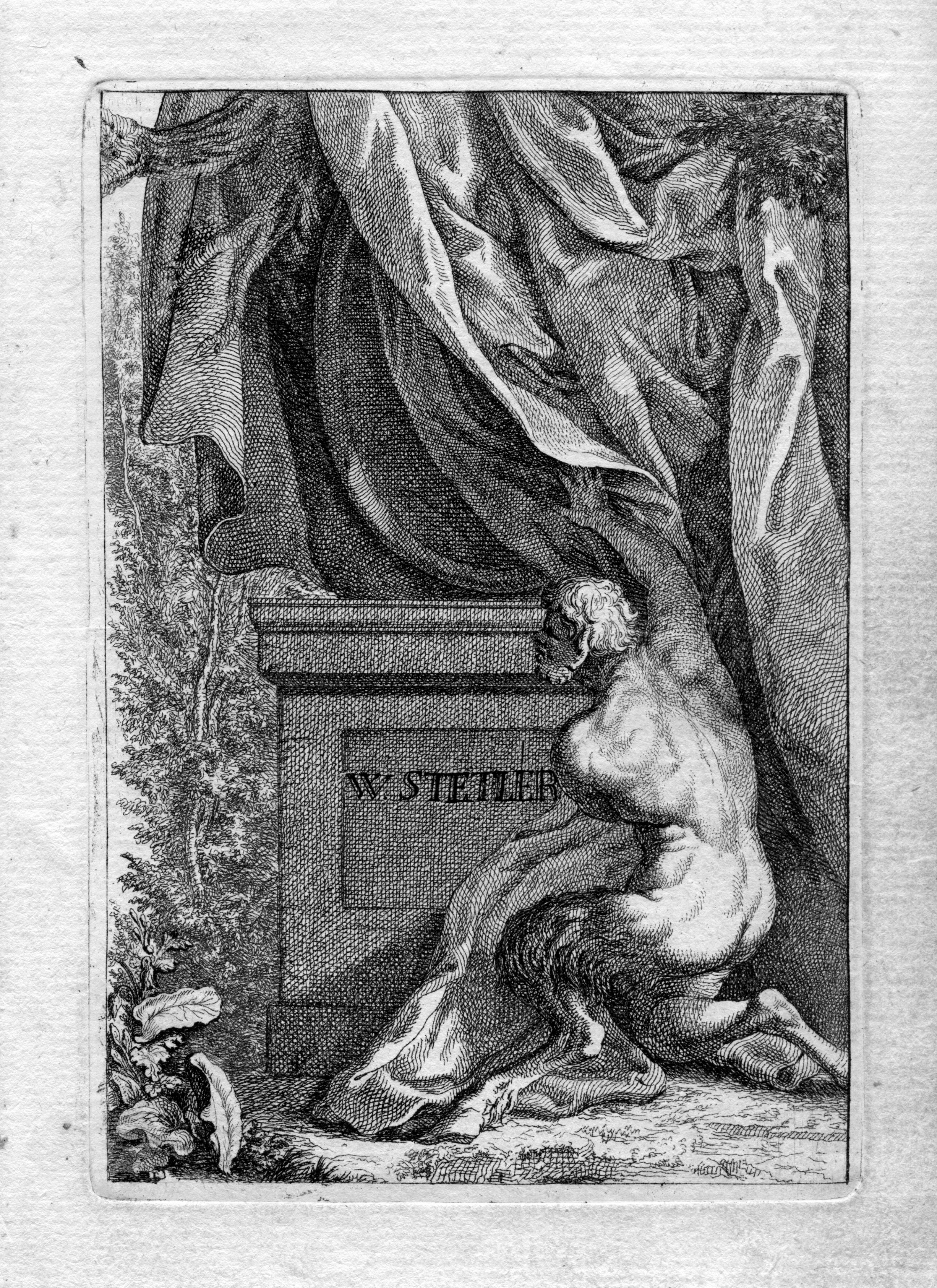 portrait gravé (voilé)